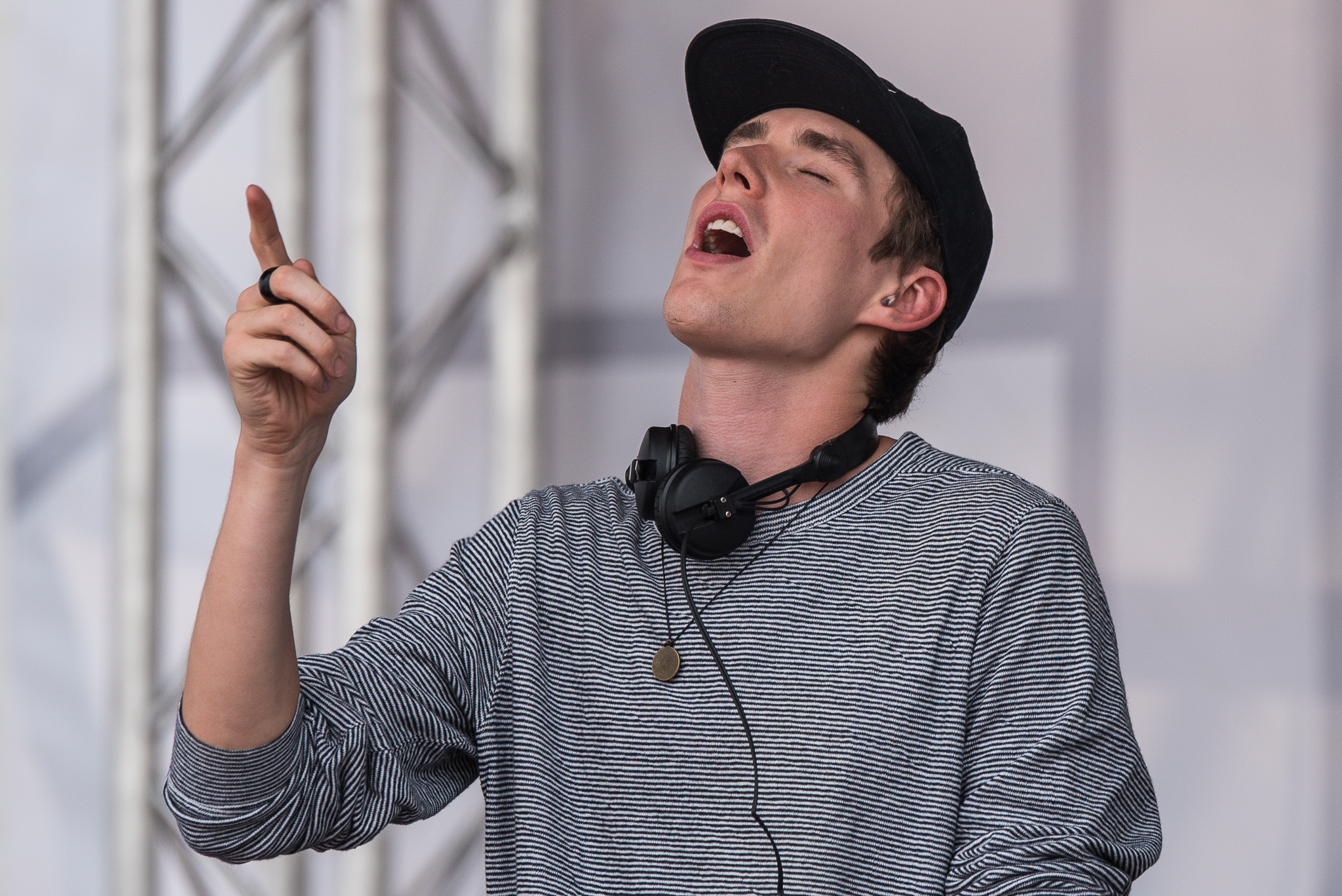 Festival,Konzert,Livekonzert,Livemusik,Lost Frequencies,Mainstage,Musik,Open Beatz 2016